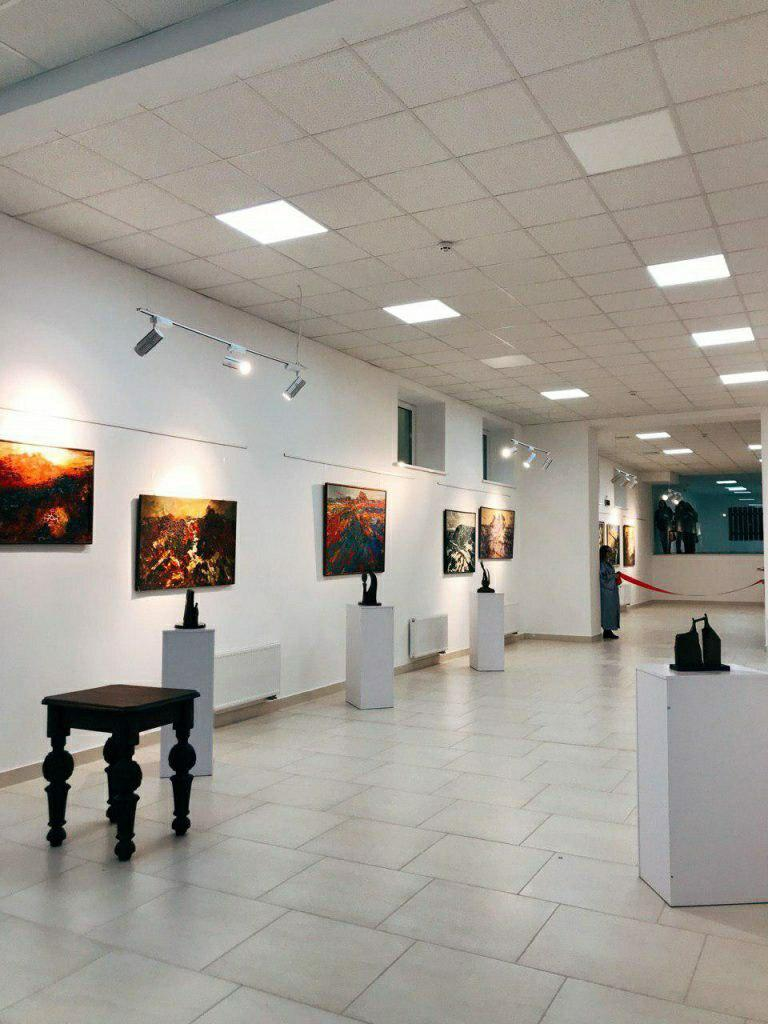 Арт-кластер Острозької академії